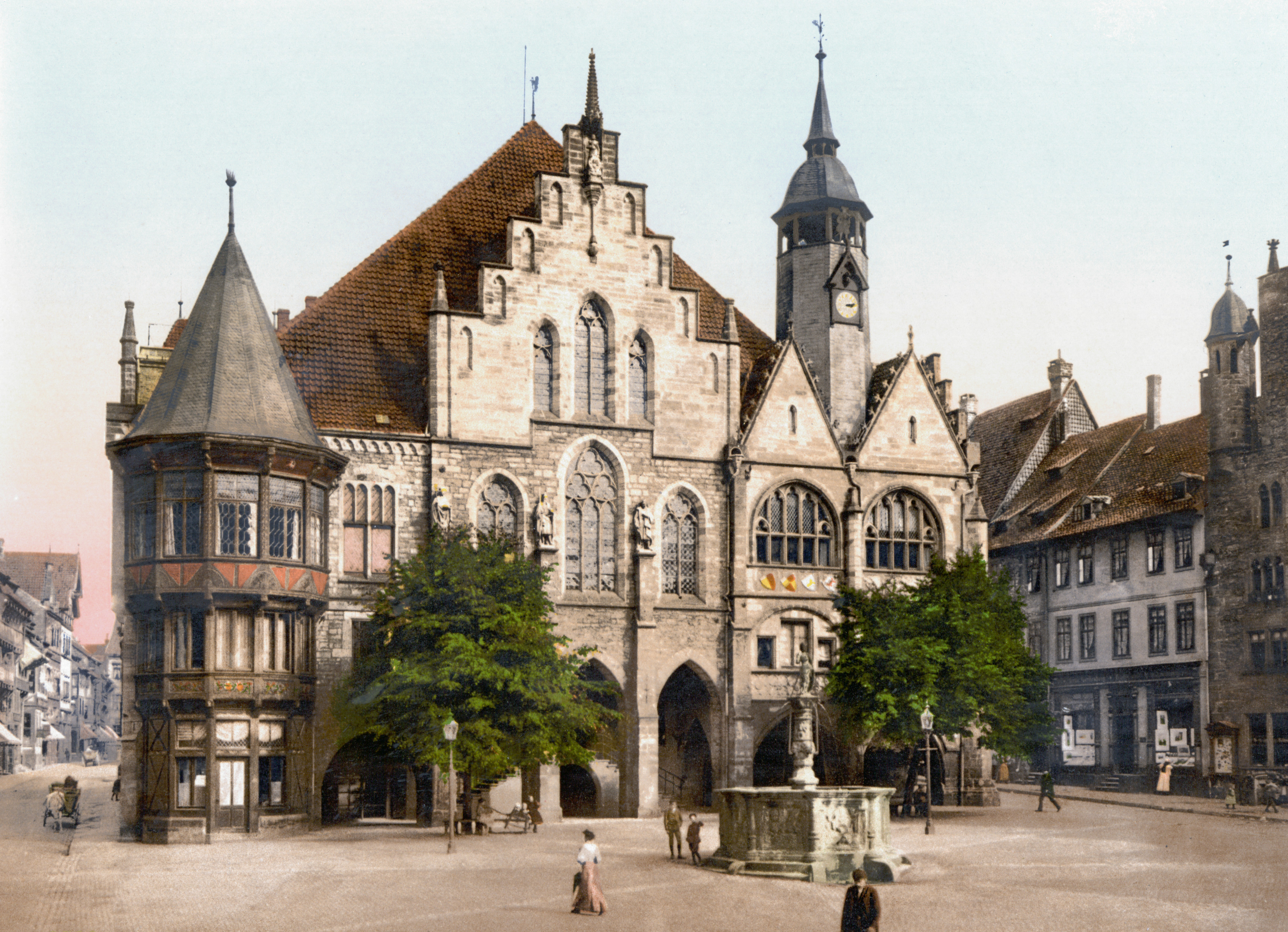 Hildesheim, Rathaus, Fassade zum Markt, wohl um 1900 nach der Erneuerung durch G. Schwartz (1883-92). Kolorierte Fotographie.